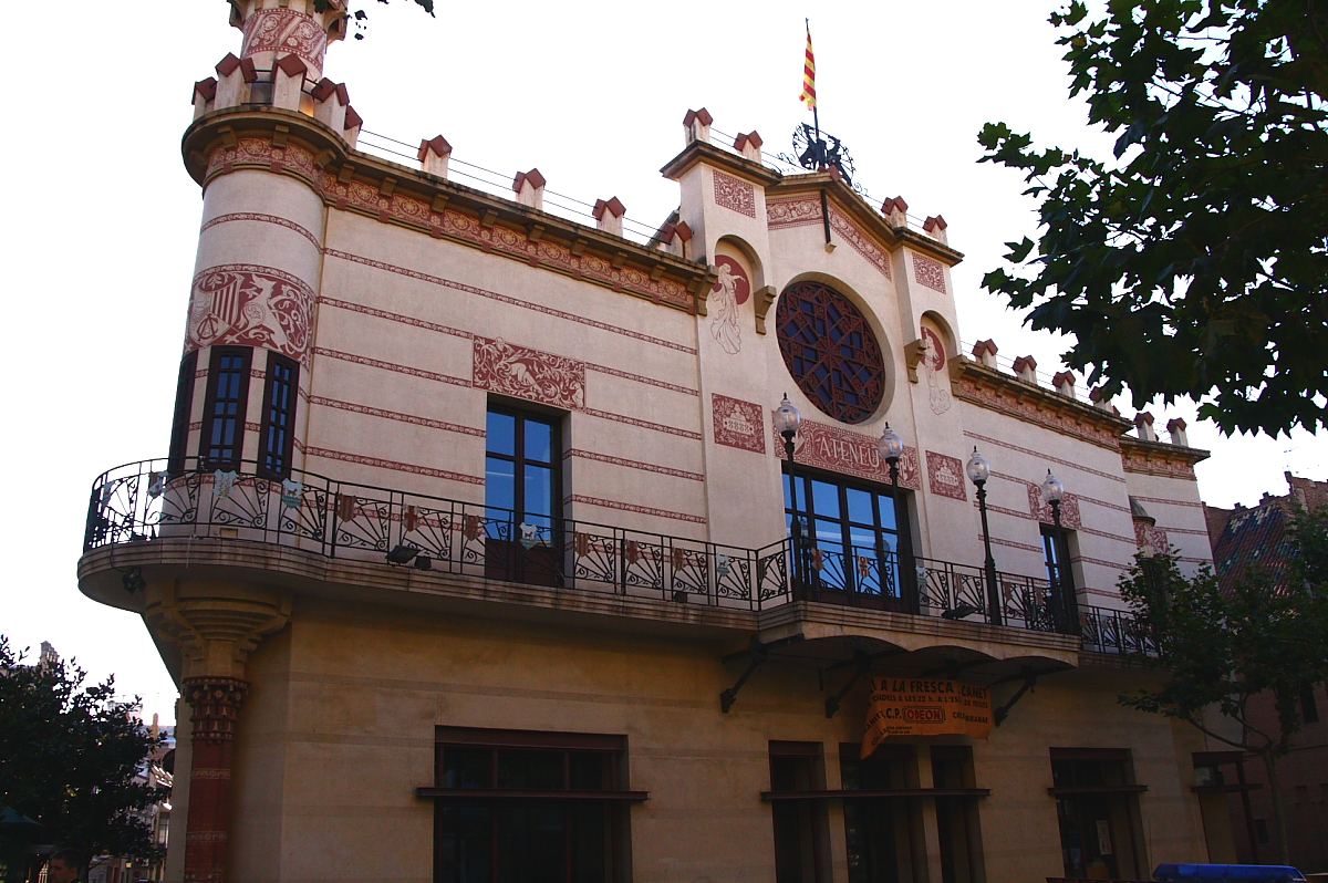 Ateneu (Canet de Mar-MAresme-Catalunya), obra de Lluís Domènech i Montaner 1885.